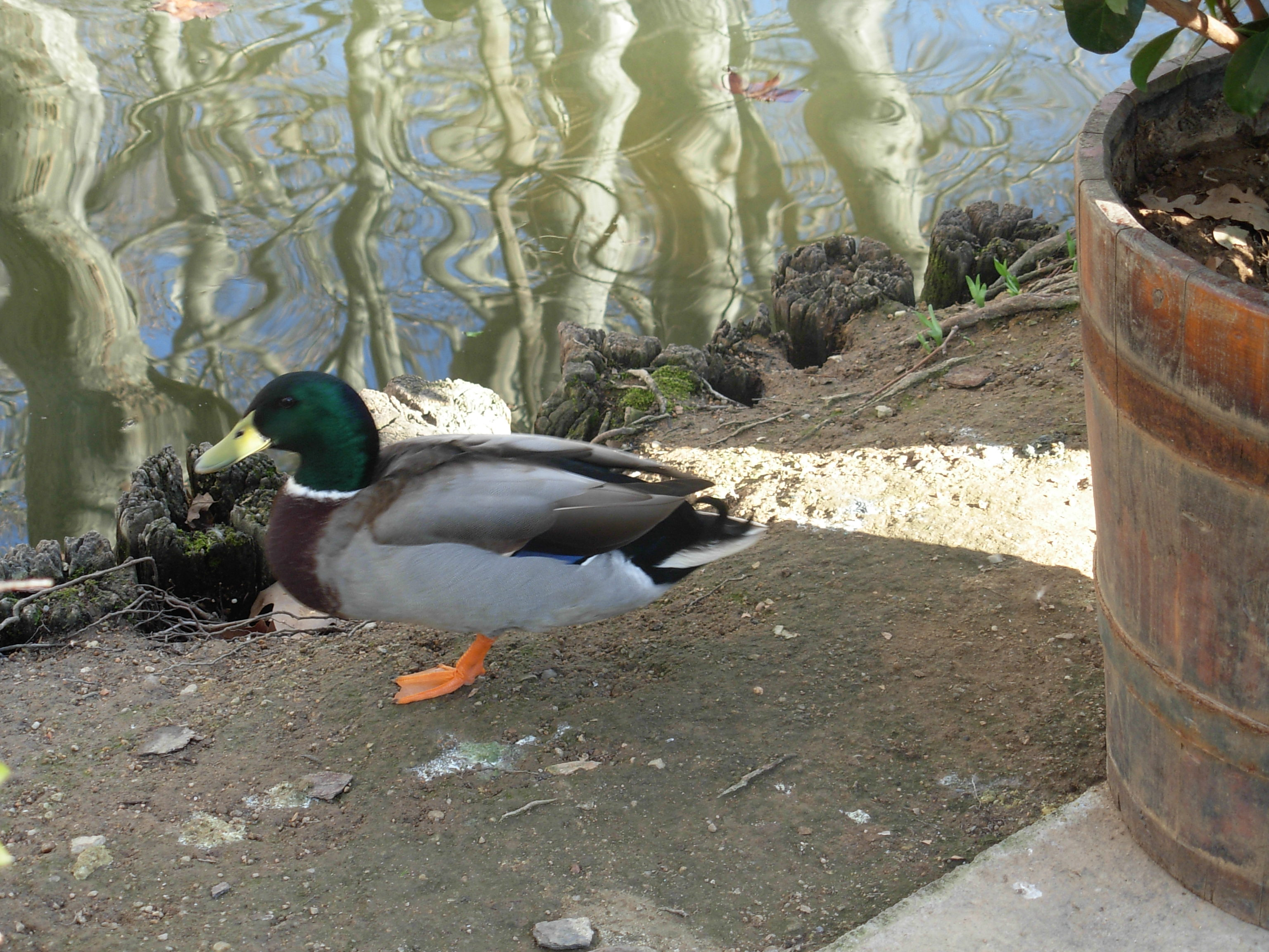 un ànec de la devesa